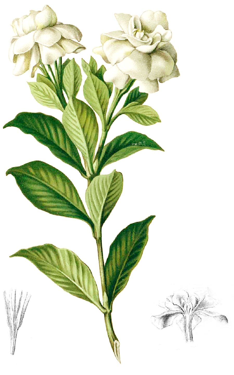 Gardenia jasminoides Plate from book